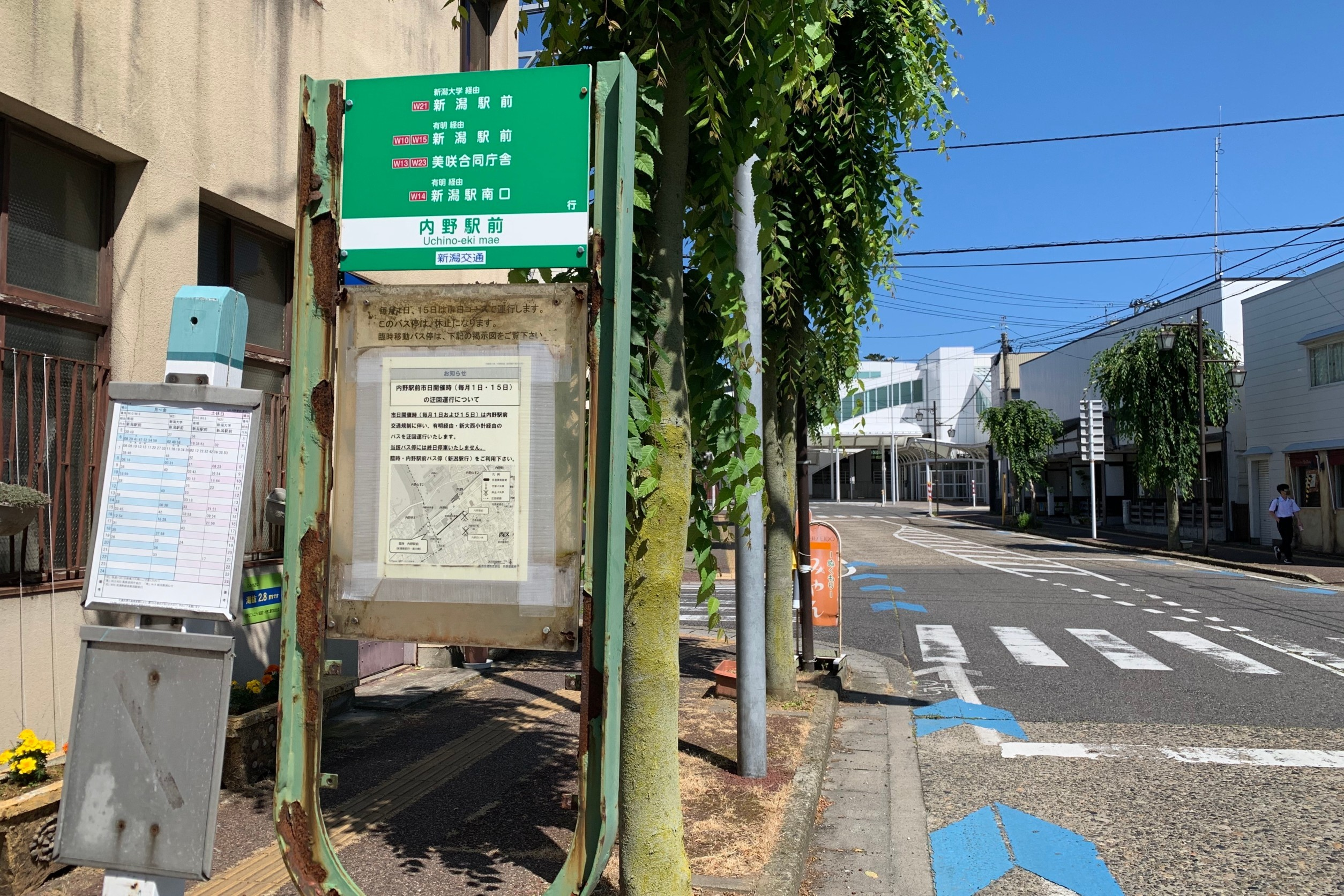 新潟交通「内野駅前」バス停（新潟市西区，2020年6月）新潟県道140号内野停車場線